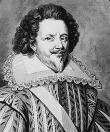 maréchal de France (1557-1629) Artist AnonymousTitle